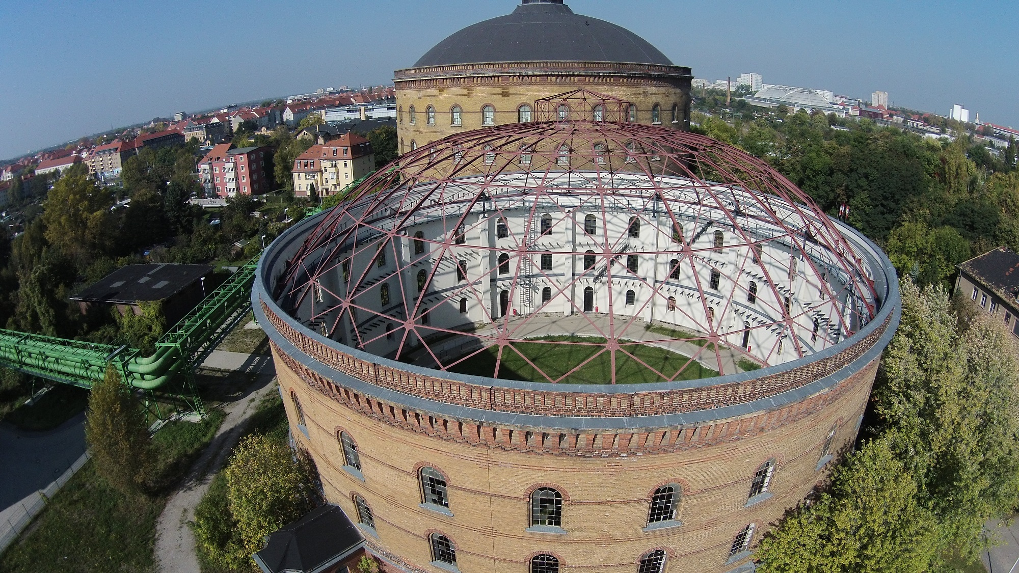 Die Arena am Panometer Leipzig als heutige OPEN-AIR-VERANSTALTUNGS-LOCATION im historischen Gasometer.